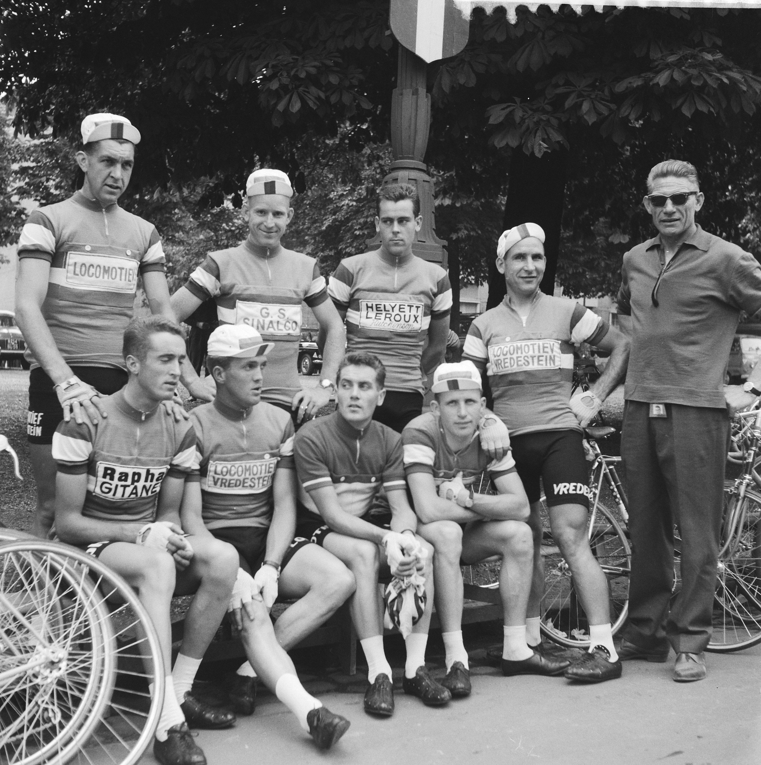 Nationaal Archief Beschrijving: De Nederlandse ploeg, Tour de France 1960 Boven van lnr Martin van de Borgh Piet van Est Jo de Roo Wim van Est Onder van lnr Ab Geldermans Coen Niesten Piet Damen Jaap Kersten Datum: 28 juni 1960 Bestanddeelnummer 911-3748 Vervaardiger: Anefo / Harry Pot (1929–1996) DescriptionDutch photographer and cinematographerDate of birth/death 1929 1996Work location Amsterdam, BentveldAuthority control : Q27877051 VIAF: 284191334 ISNI: 0000 0003 9050 874X Koninklijke: 073478326 creator QS:P170,Q27877051 URL: Voor meer informatie over het Nationaal Archief: Voor meer foto's uit deze en andere collecties, bezoek onze Beeldbank:, U kunt ons helpen onze kennis van de fotocollecties te verrijken door tags en commentaren toe te voegen. Herkent u mensen of locaties of heeft u een bijzonder verhaal te vertellen bij één van de foto's, laat dan een reactie achter (als u ingelogd bent bij Flickr) of stuur een mailtje naar